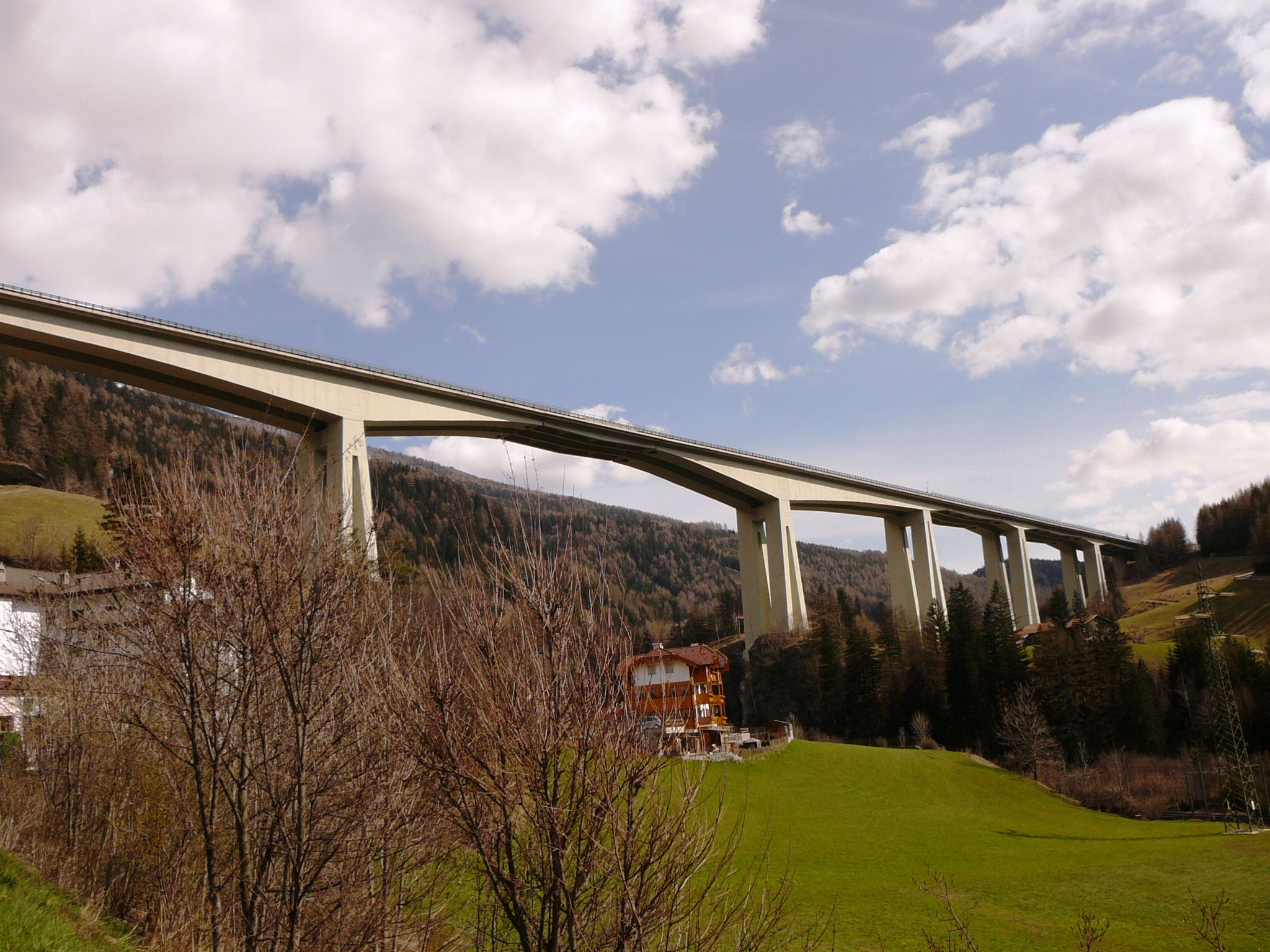 Il viadotto dell'Autobrennero all'altezza di Colle Isarco